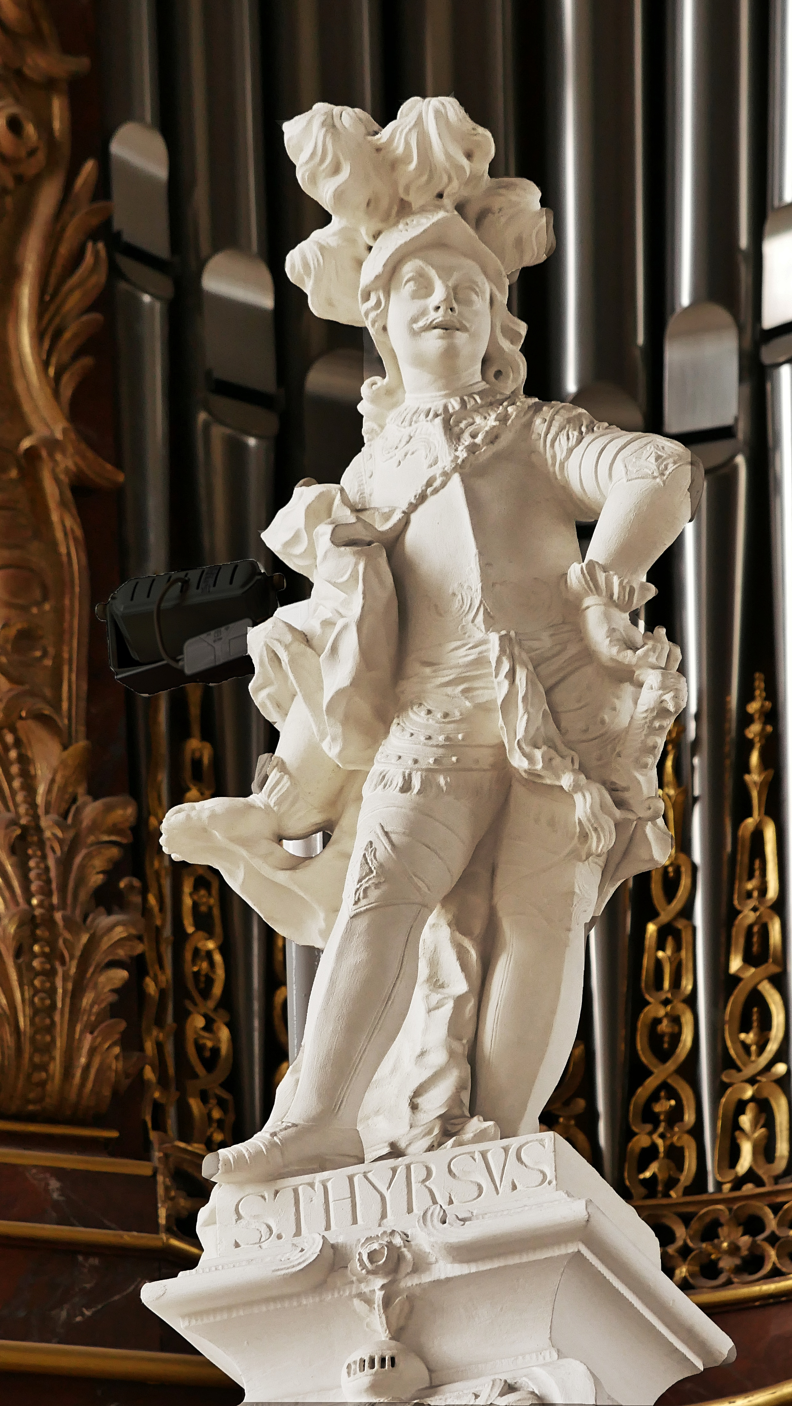 Basilika St. Paulin, Trier, Statue des St. Thyrsus an der Orgelempore